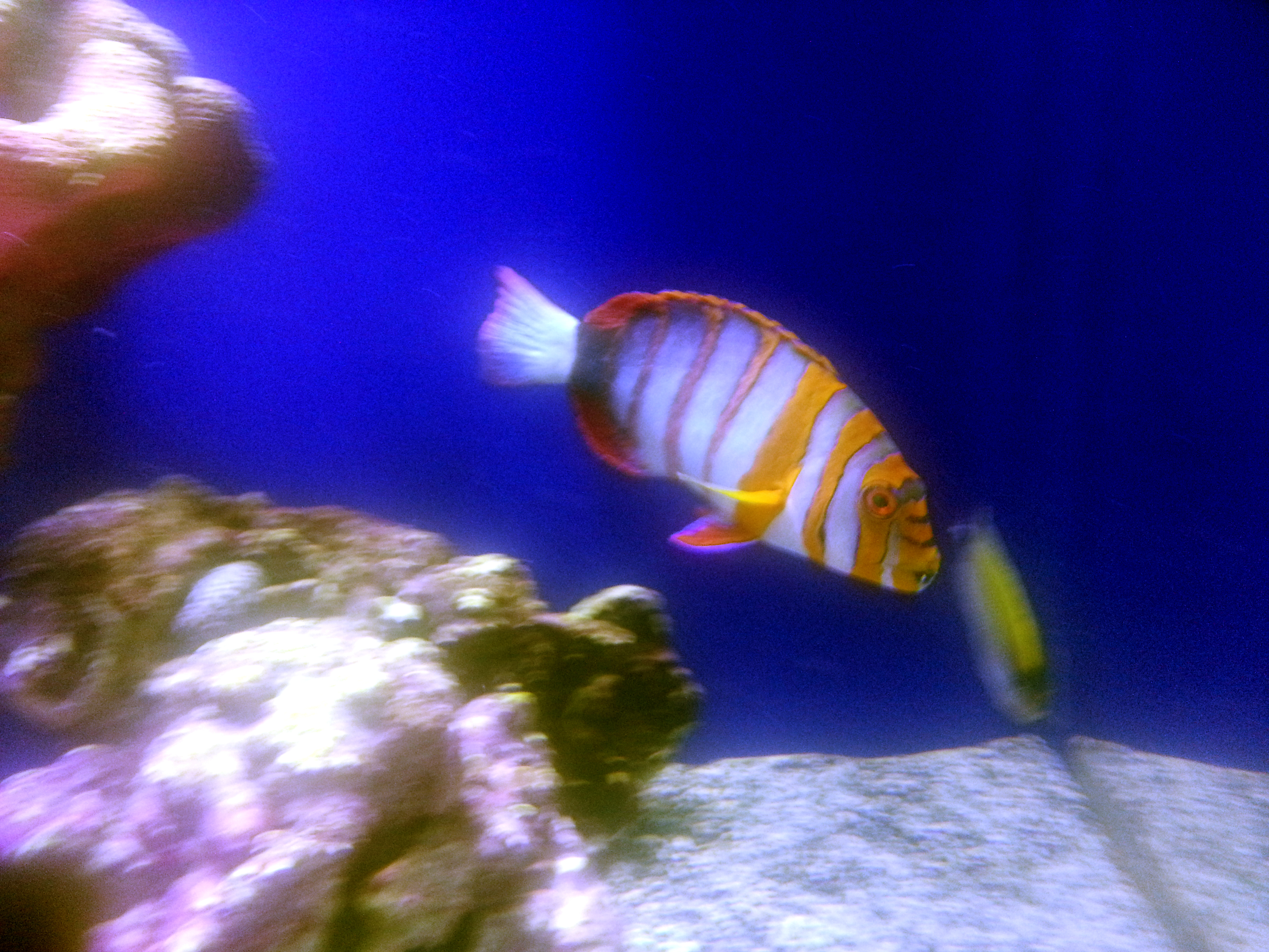 Pez del cual se desconoce su especie encontrado en el acuario.Acuario Inbursa, Ciudad de México, México.